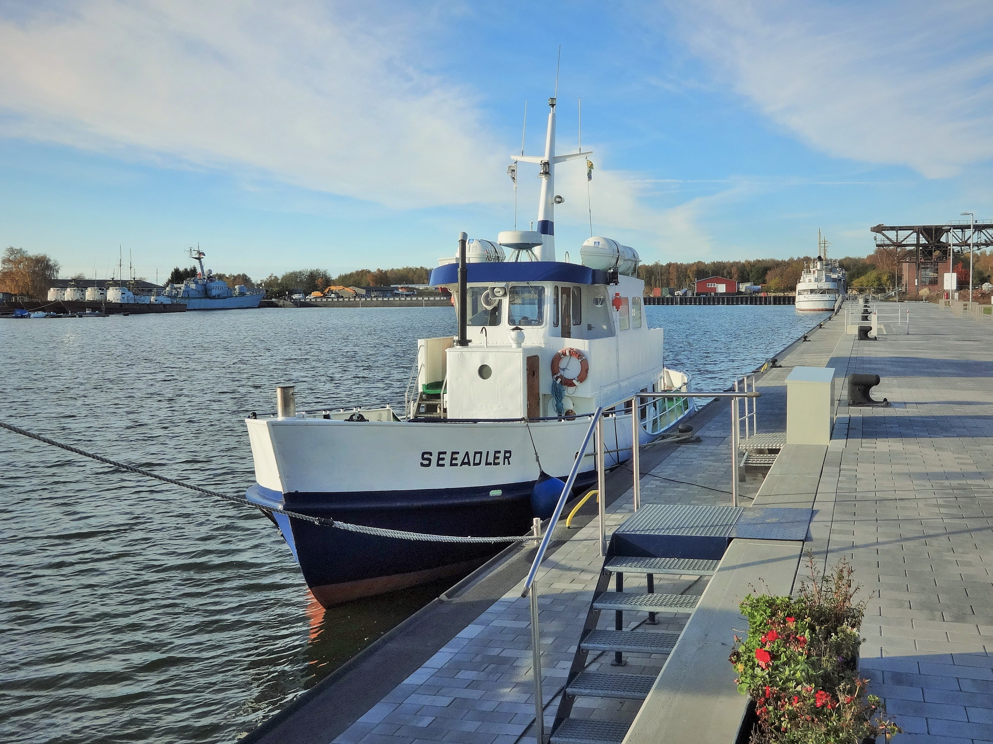 MS Seeadler am 30.10.2016 in Peenemünde